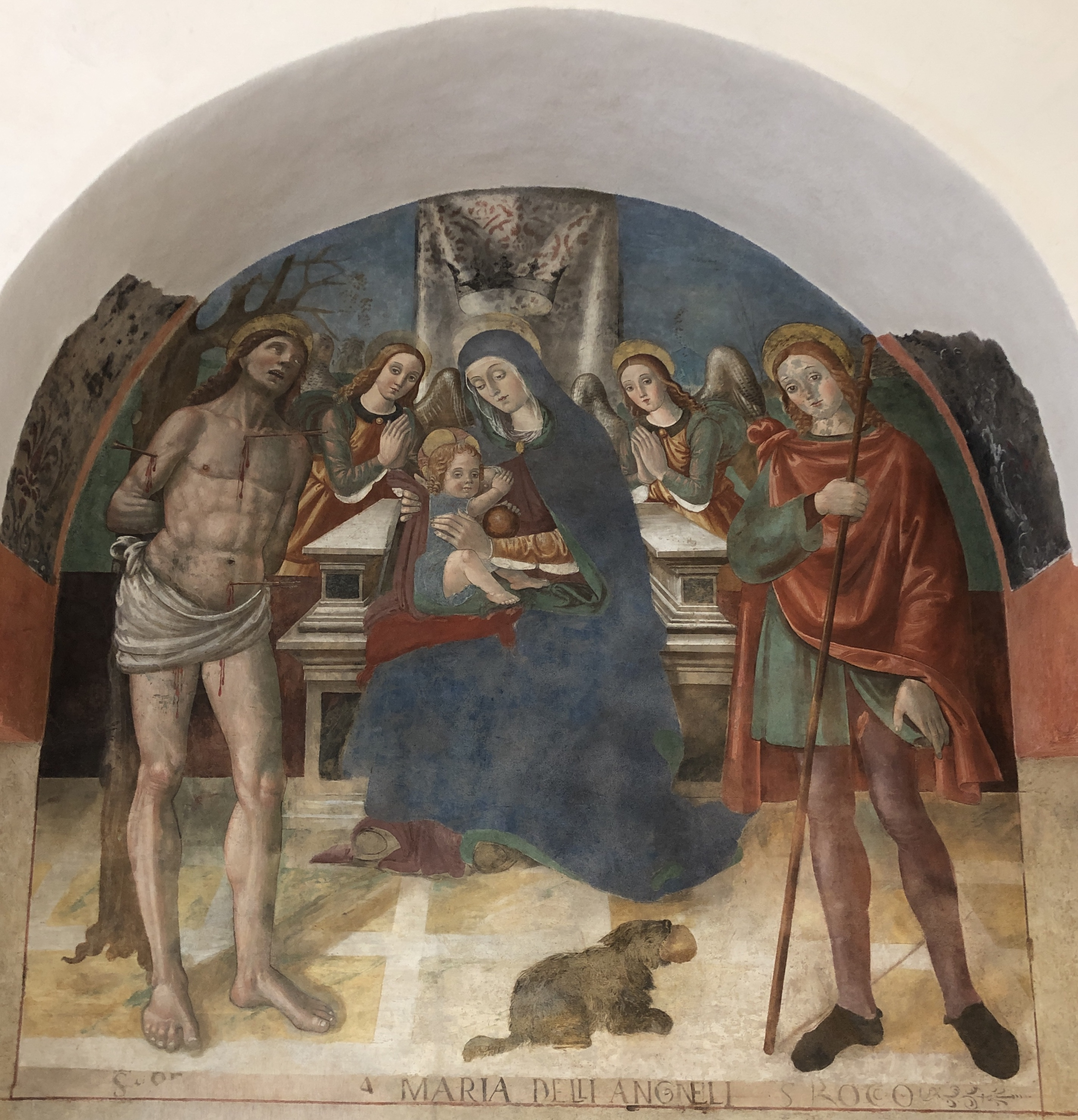 Affresco di Francesco da Montereale - "Santa Maria degli Angeli tra San Sebastiano e San Rocco", chiesa San Silvestro in L'Aquila.